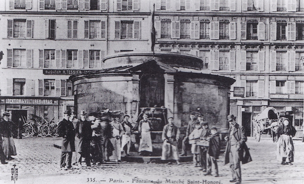 La fontaine du Marché-Saint-Honoré vers 1905 (détruite en 1955). Place du Marché-Saint-Honoré, Paris (1er arrond.). Carte postale, photographe non déterminé, édition Royer-Nancy.